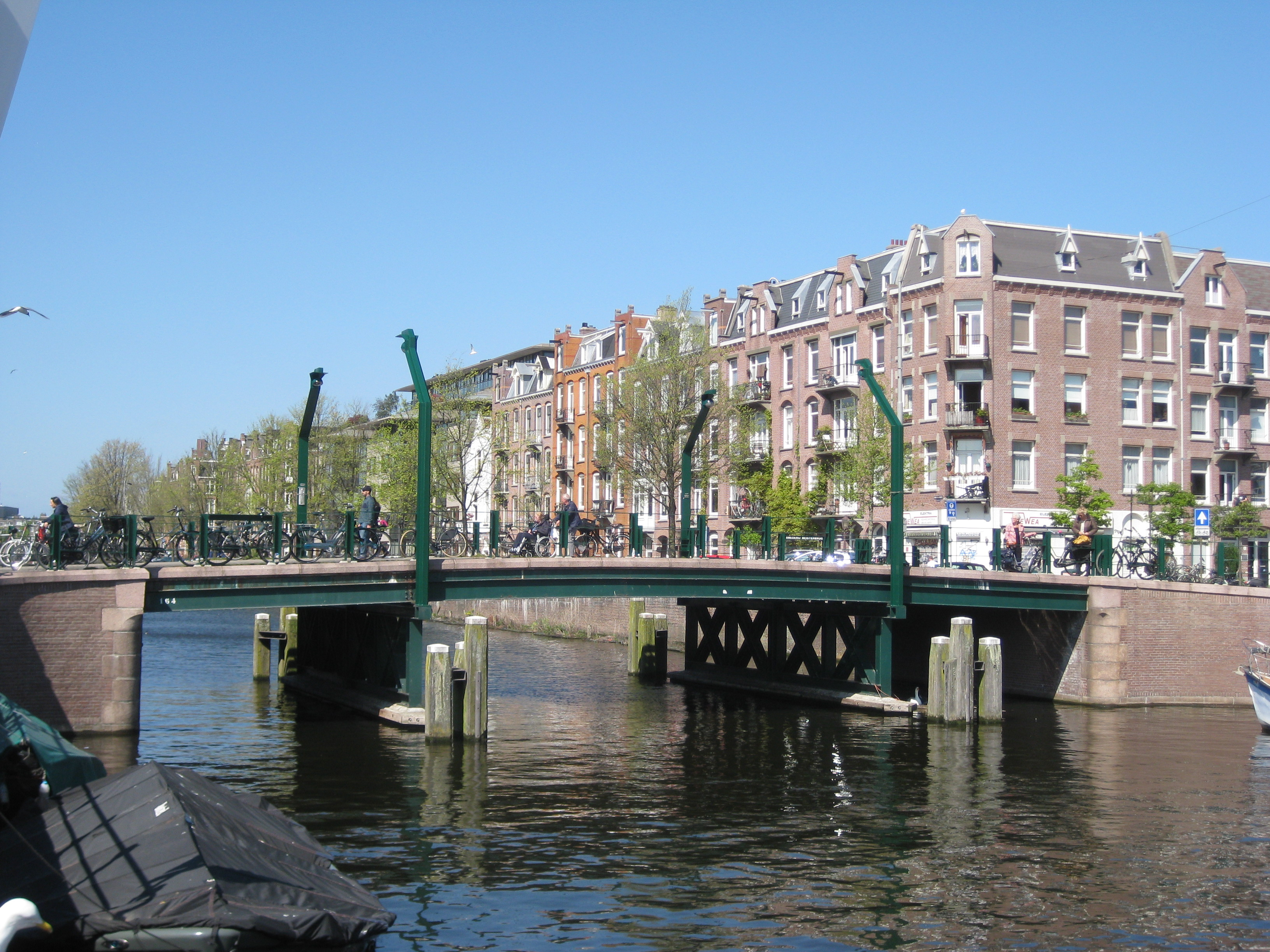 Smederij Meisterbrug over de Bilderdijkgracht in Amsterdam-West. Brugnummer 164. In 2009 genoemd naar de Smederij Meister in de Bellamystraat in verband met 100-jarig bestaan.